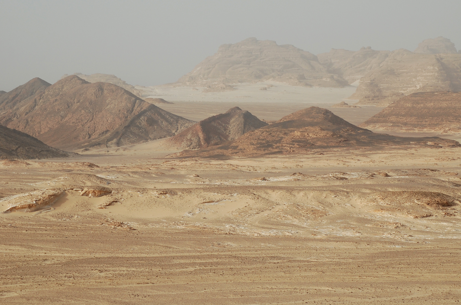 Sinai Egypt